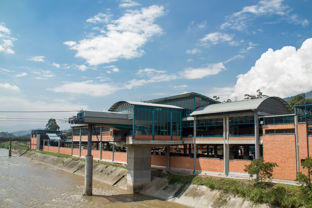 Estación Acevedo Metro de Medellín